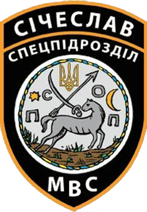 Емблема батальйону спеціального призначення МВС «Січеслав».